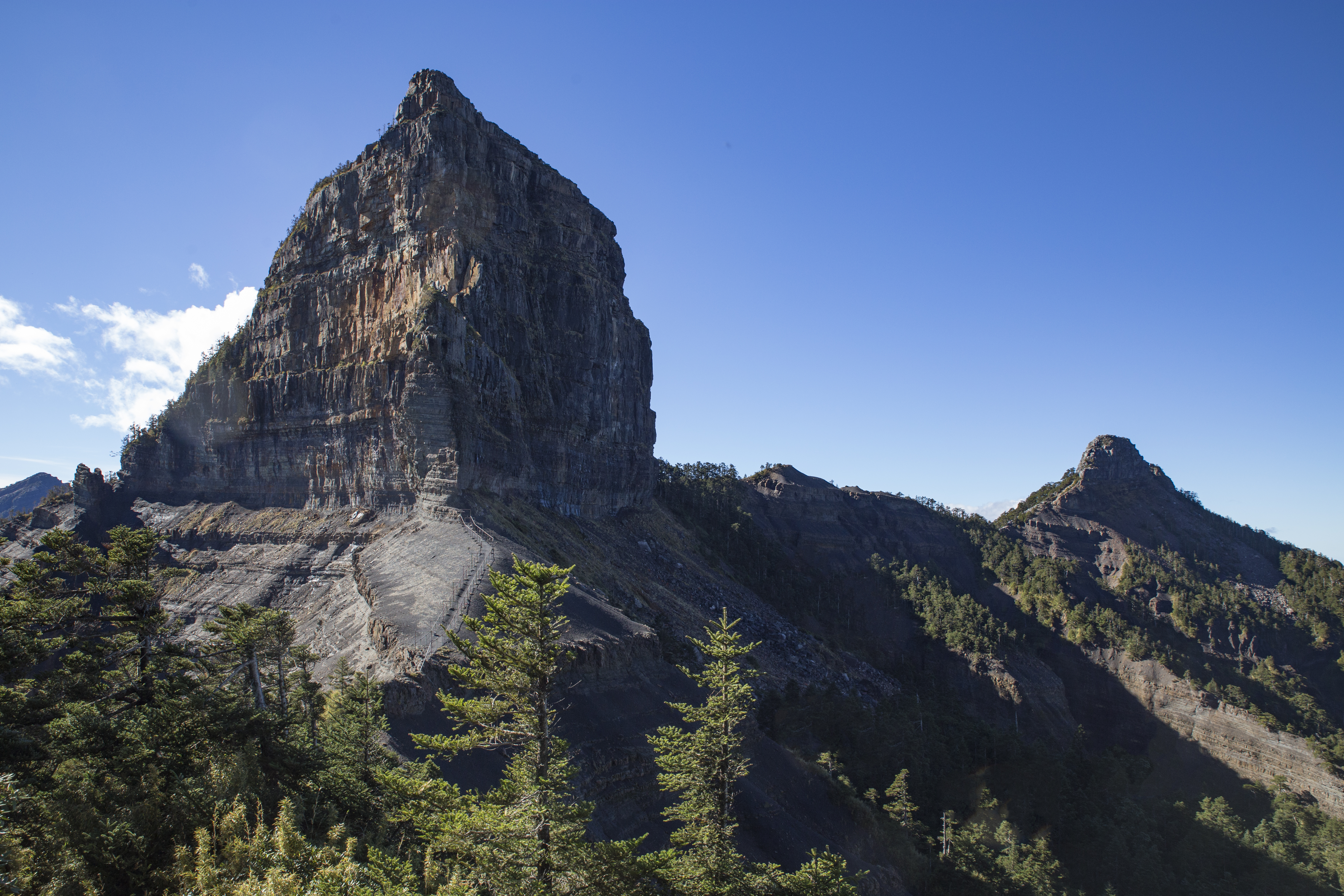 大小霸尖山